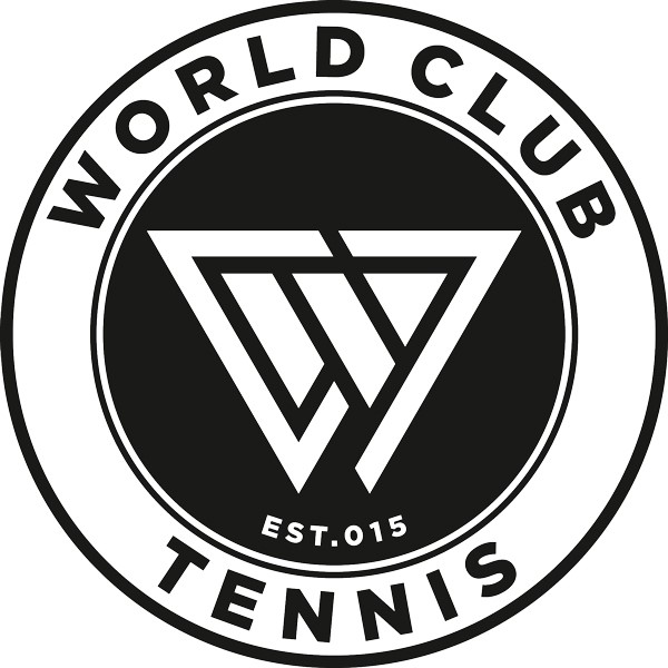 Das Bild zeigt das Logo von World Club Tennis und wurde mit Einverständnis der Gründer hochgeladen